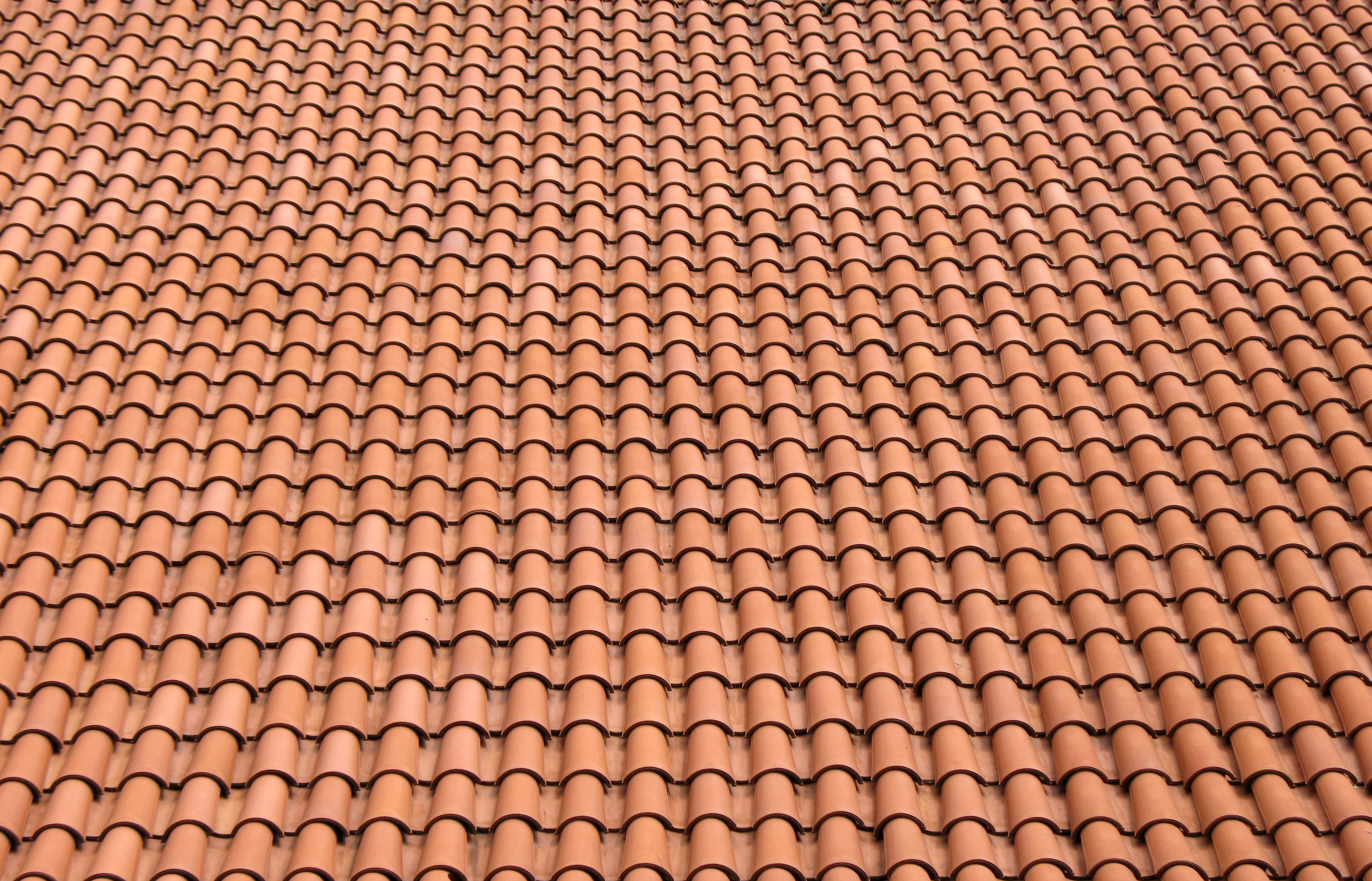 Pokrycie dachowe typu "mnich i mniszka"